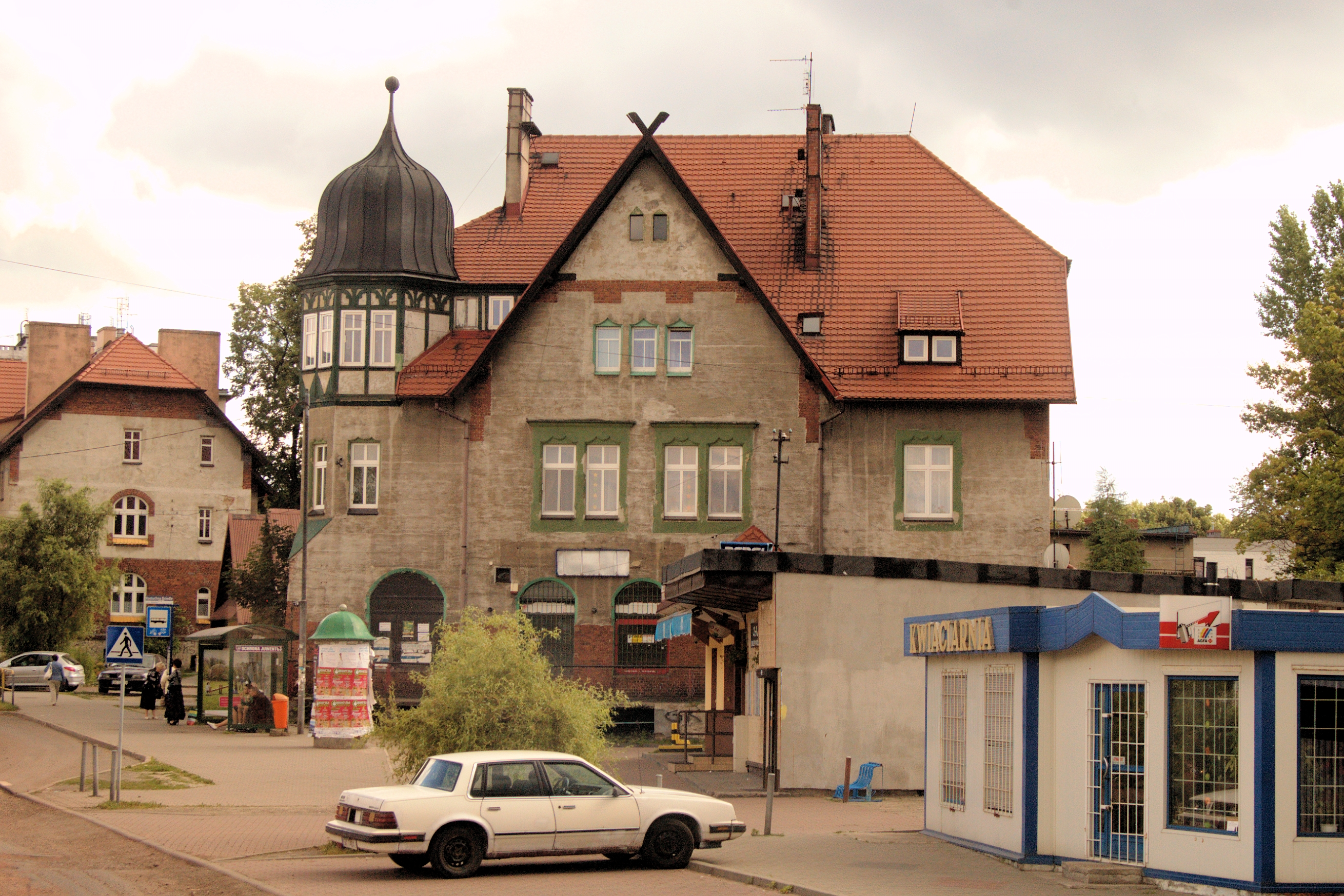 66 Katowice Kostuchna